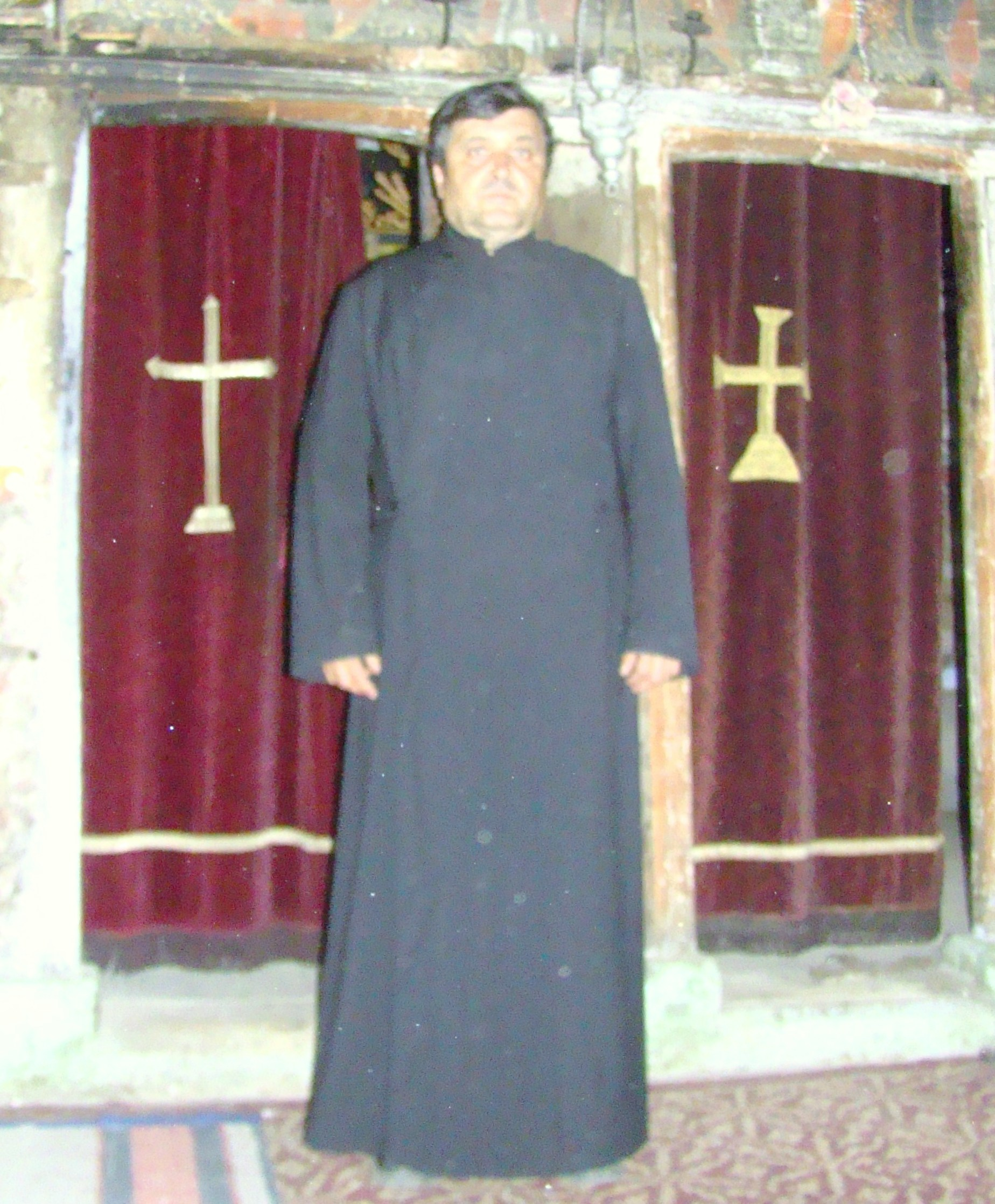 Biserica de lemn „Sfântul Ioan Evanghelistul” din Apoldu de Jos, comuna Apoldu de Jos, judeţul Sibiu